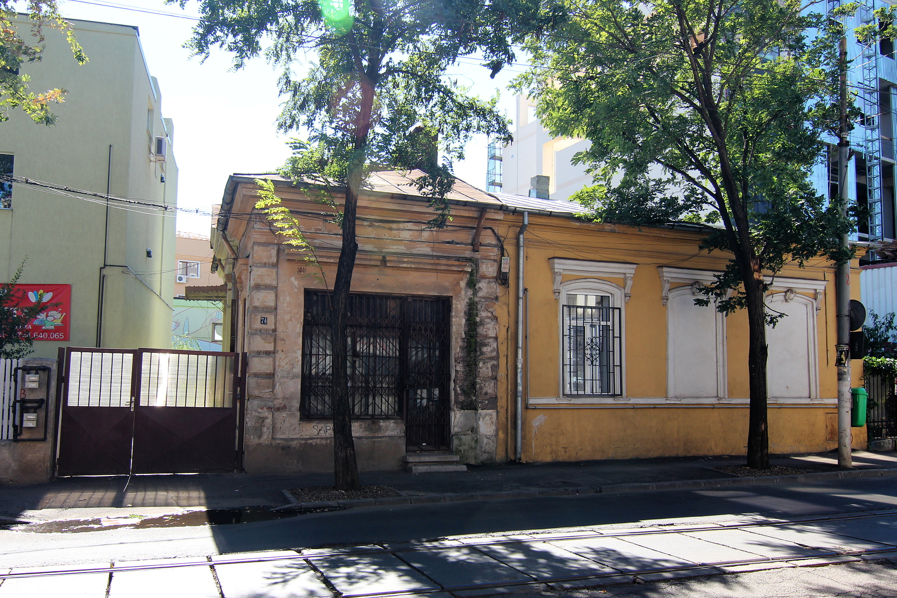 Casă pe Calea Călărașilor